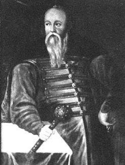 Беларуская (тарашкевіца): Гетман вялікі літоўскі Януш Кішка